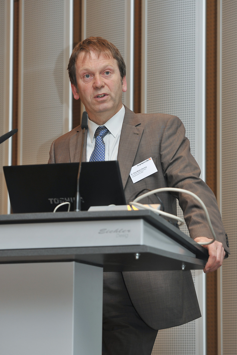 Energiemarktdesign im Systemzusammenhang: Zusammenspiel der Sektoren Strom, Wärme und Verkehr Am 5. September 2013 veranstaltete die EnergieAgentur.NRW in Kooperation mit dem Ministerium für Klimaschutz, Umwelt, Landwirtschaft, Natur- und Verbraucherschutz des Landes Nordrhein-Westfalen eine Tagung zum Thema „Energiemarktdesign im Systemzusammenhang: Zusammenspiel der Sektoren Strom, Wärme und Verkehr“ im S-Forum im Finanzkaufhaus der Düsseldorfer Stadtsparkasse. Schwerpunkt der Veranstaltung ist die Rolle der Erneuerbaren Energien in den Bereichen Strom, Wärme und Verkehr und ein aktiver Austausch über die Erfordernisse für ein zukünftiges Design des Energiesystems.